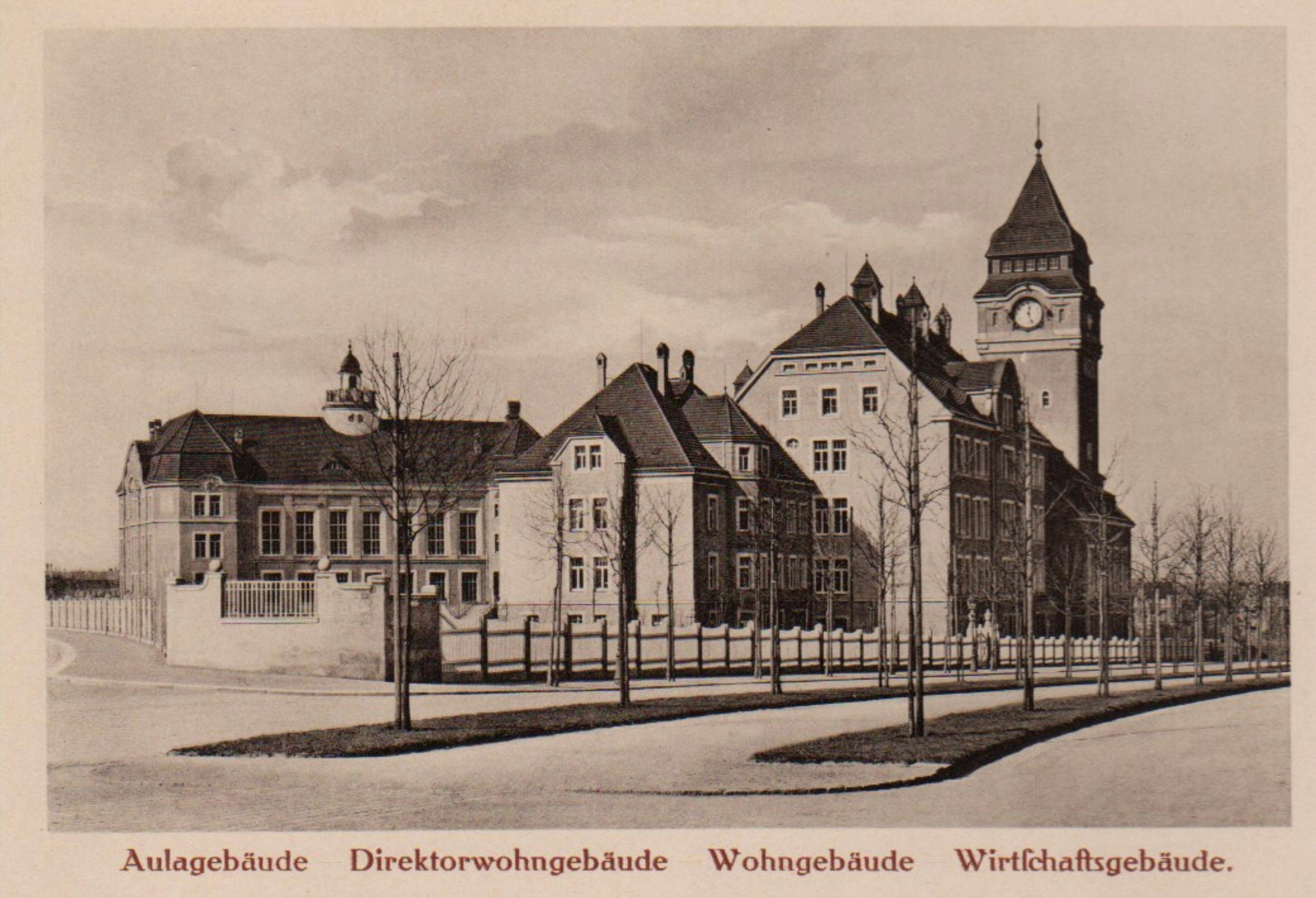 Dresden, Königliches Lehrerseminar Dresden-Strehlen (nach Wiederaufbau TU-Gebäude am Weberplatz), Ansicht Teplitzer Straße 1910